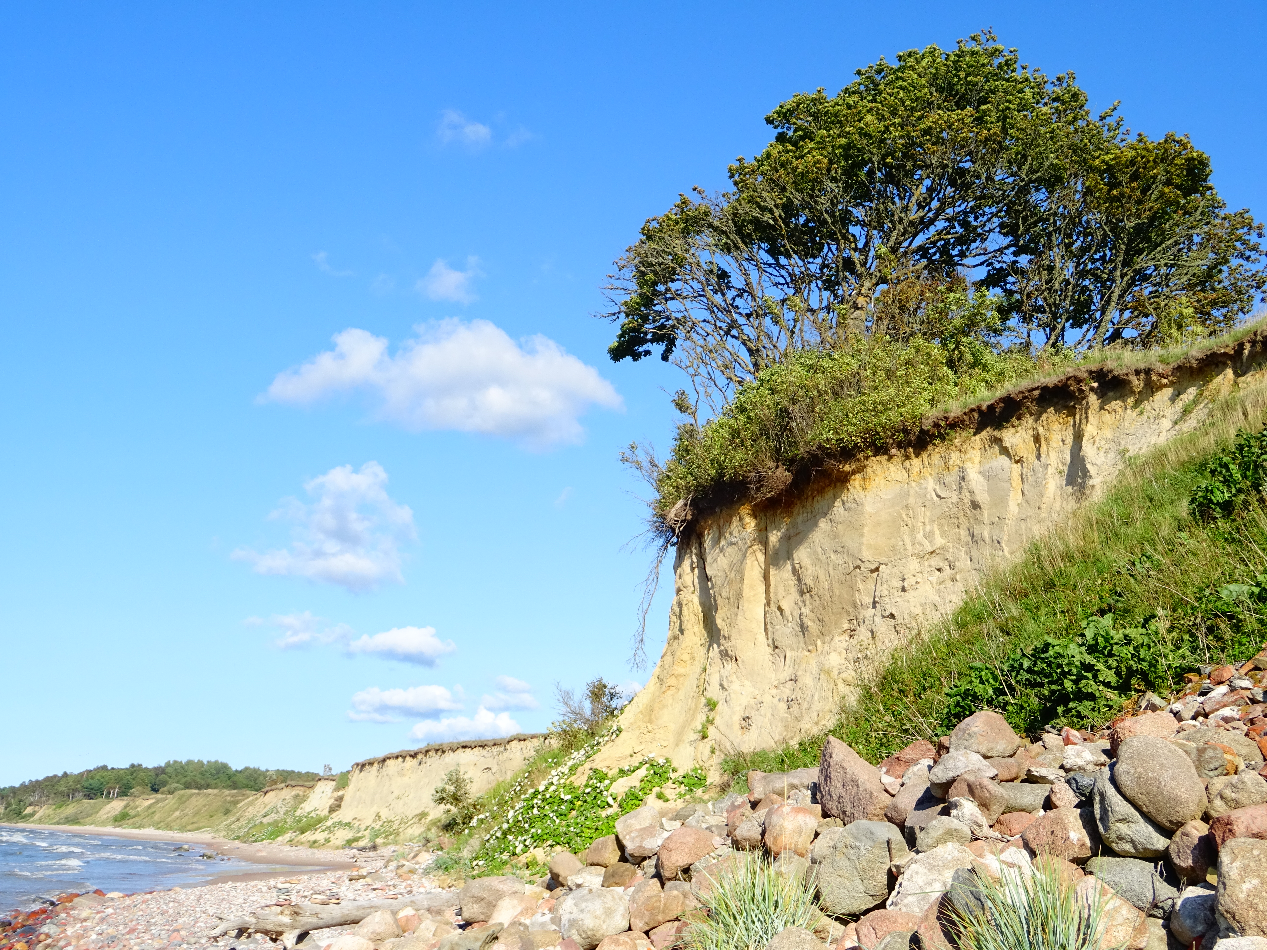 undefined